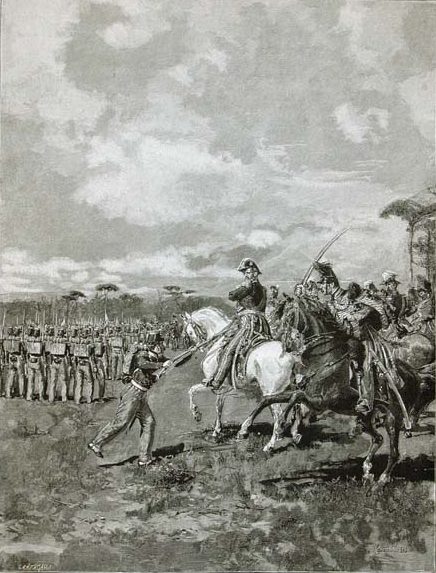 Agesilao Milano attenta alla vita di re Ferdinando II di Borbone, autore Matania Edoardo dis- Cantagalli inc., data 1889.